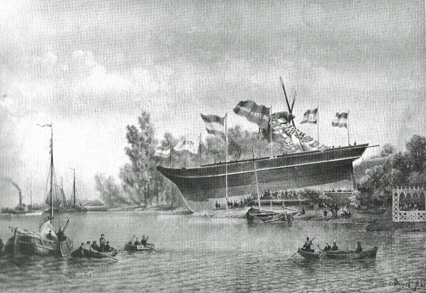 Litho van de tewaterlating van de bark "De Stad Gouda" op 22 mei 1857 op de scheepswerf "Het Kromhout" in Gouda